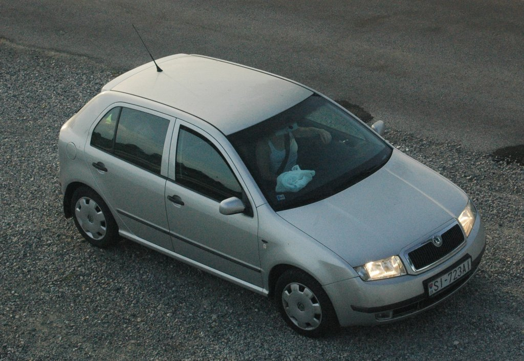 Škoda Fabia Comfort